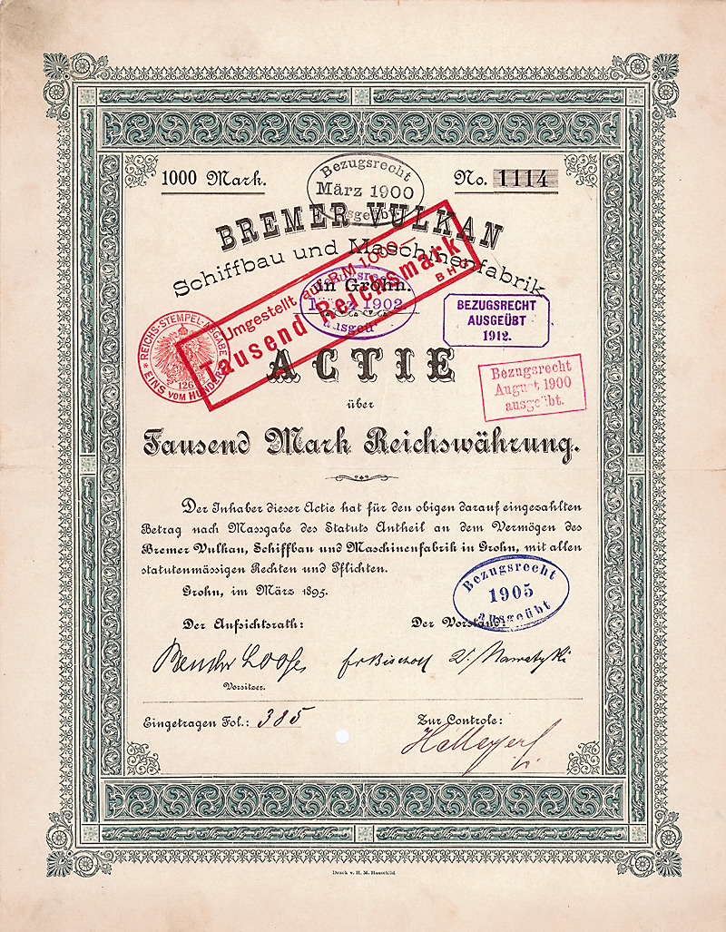 Aktie über 1000 Mark der Bremer Vulkan Schiffbau und Maschinenfabrik vom März 1895